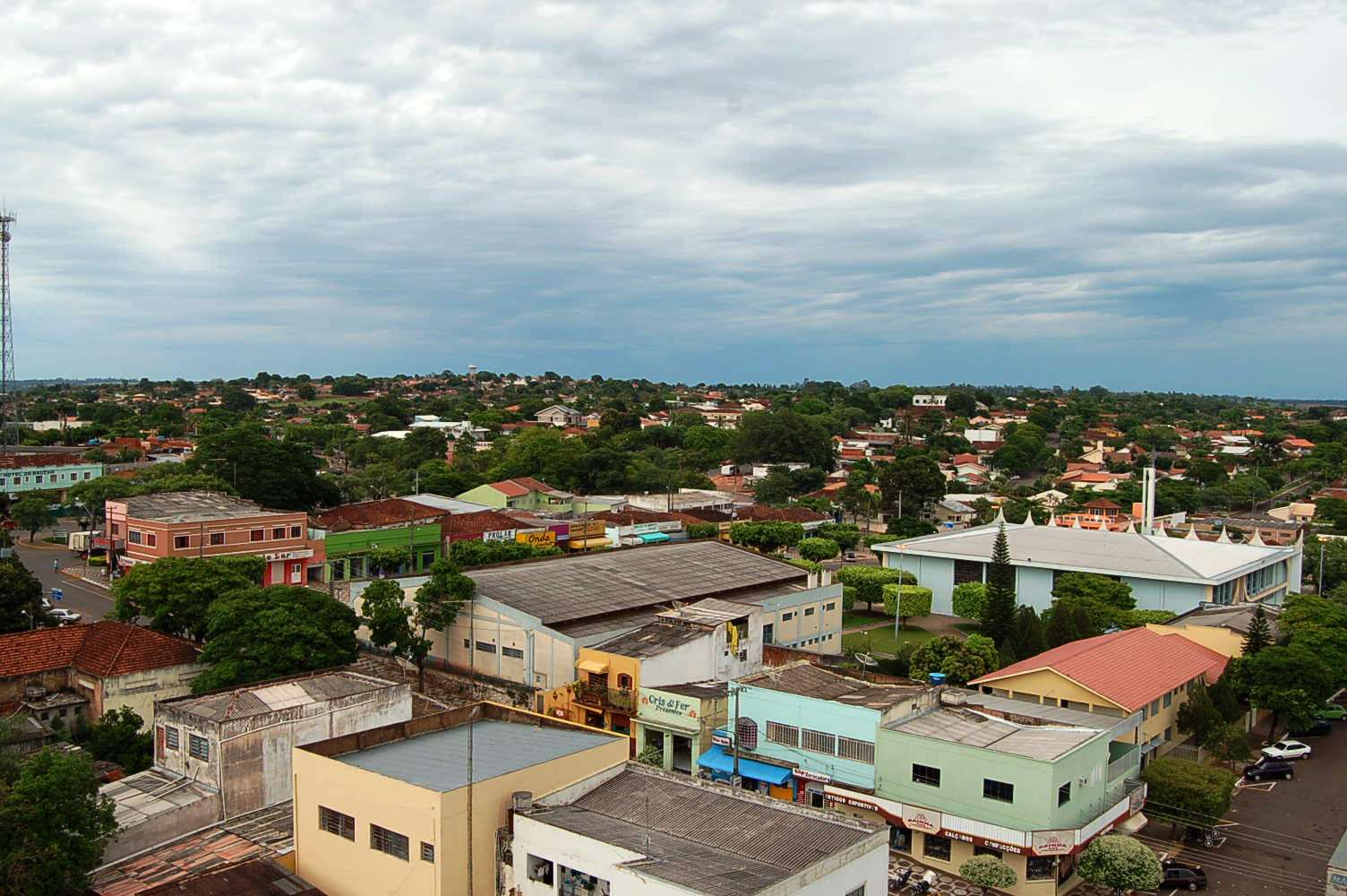 Panôramica de Cruzeiro do Oeste